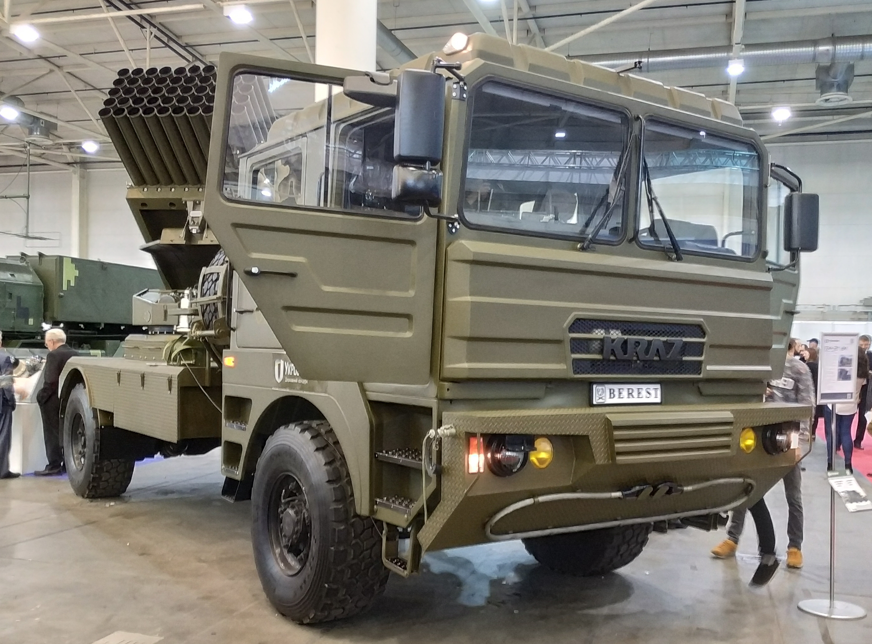 Реактивная система залпового огня БМ-21УМ "Берест" в экспозиции Шепетовского ремонтного завода. Выставка "Зброя та безпека", Киев, октябрь 2018 г.